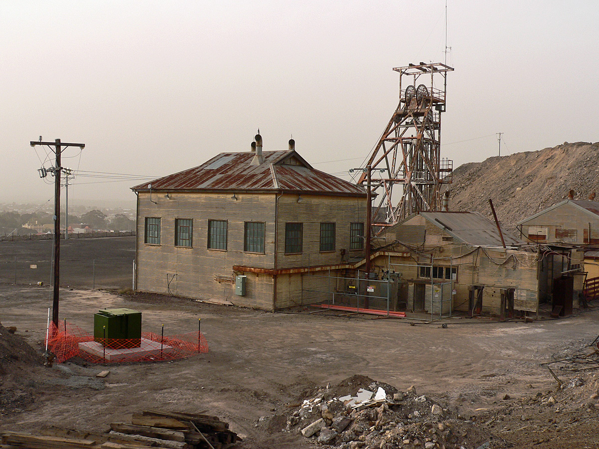 Mine